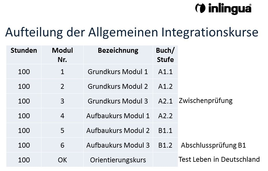 Aufteilung der Allgemeinen Integrationskurse ab 01.10.2016